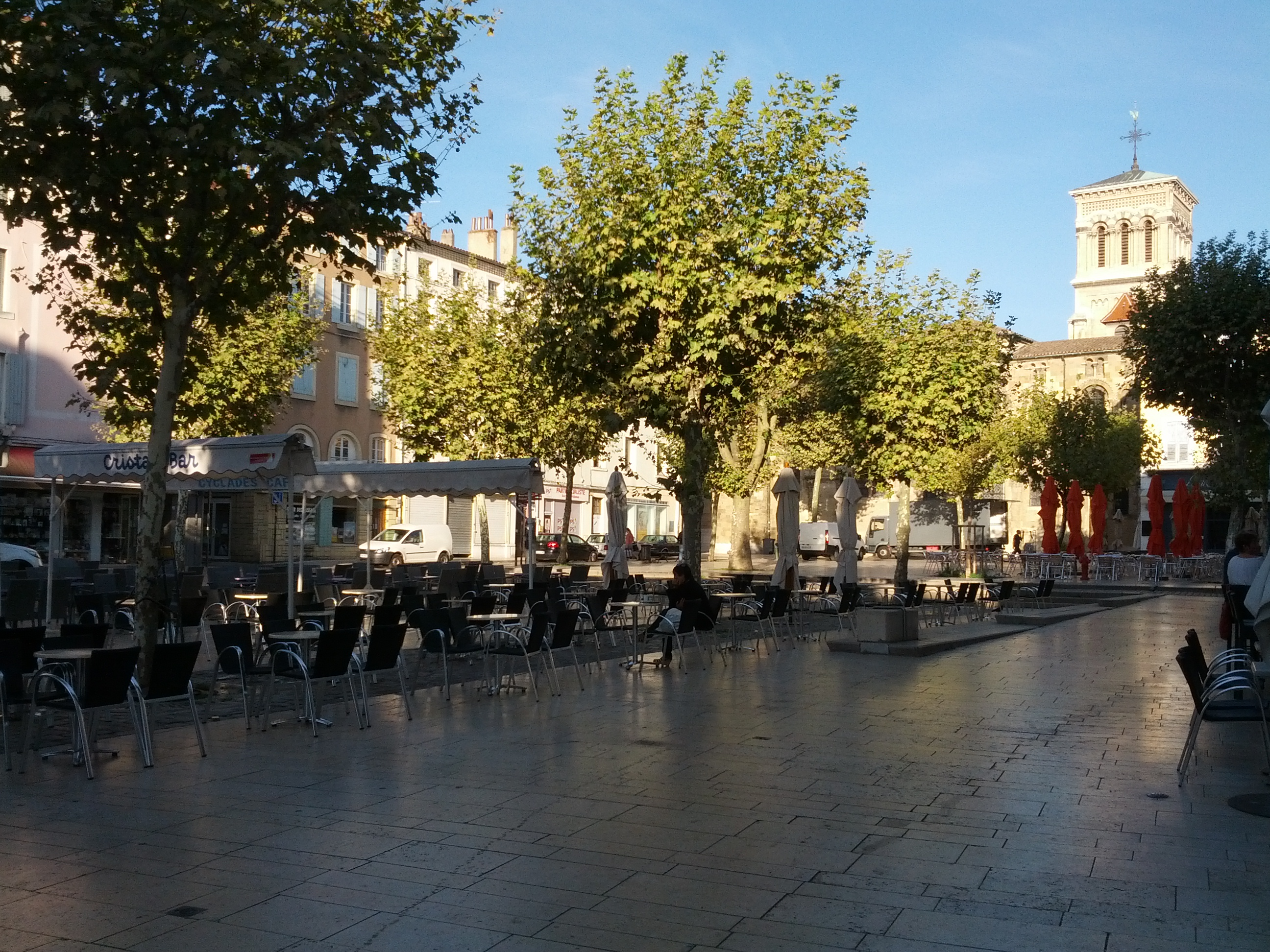 La place des Clercs à Valence.